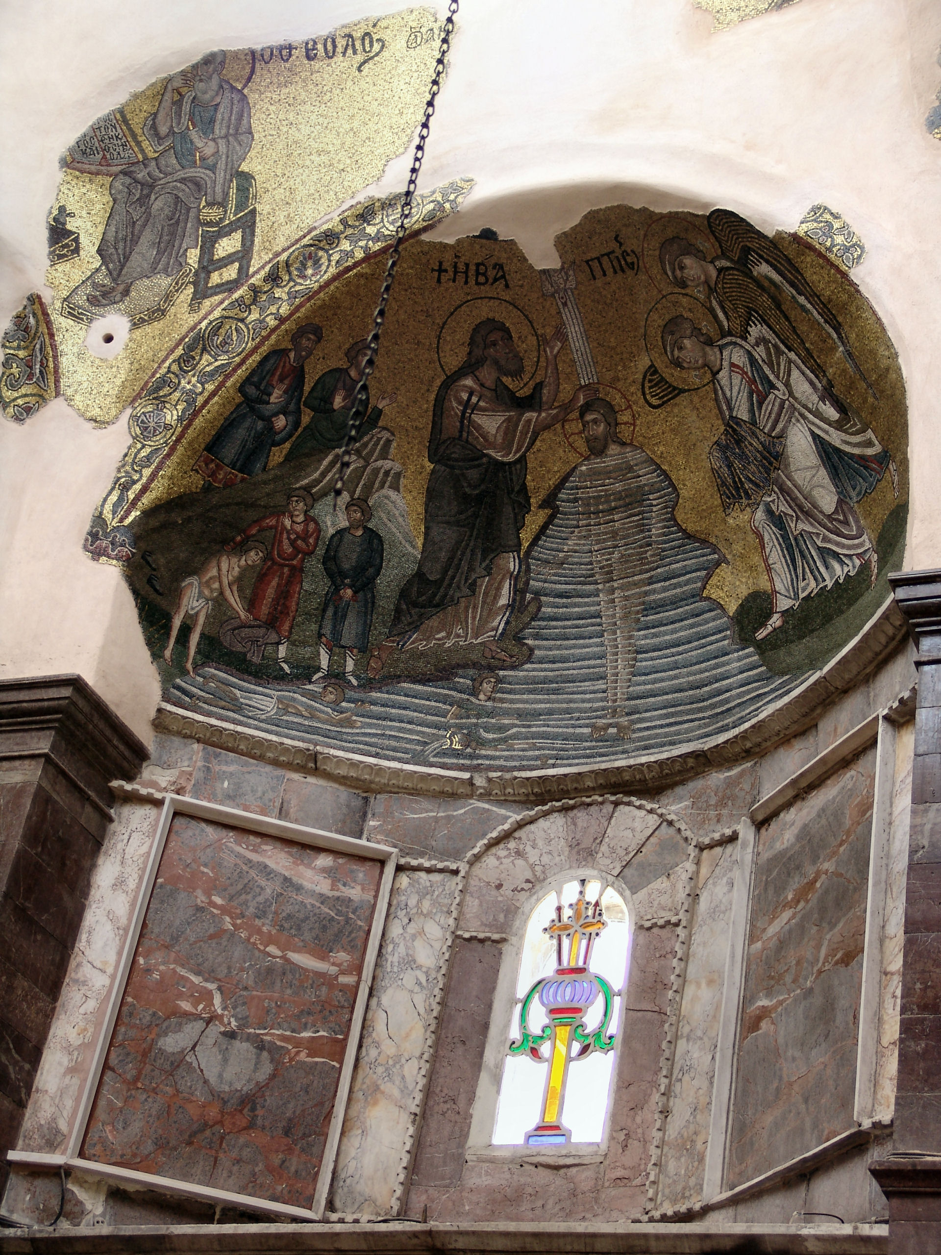 Nea Moni Monestary